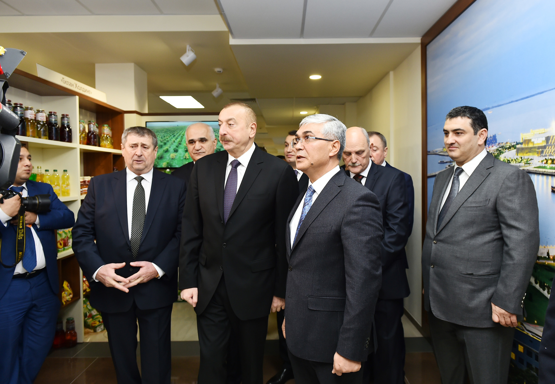 İlham Əliyev Minskdə Azərbaycan Ticarət Evində